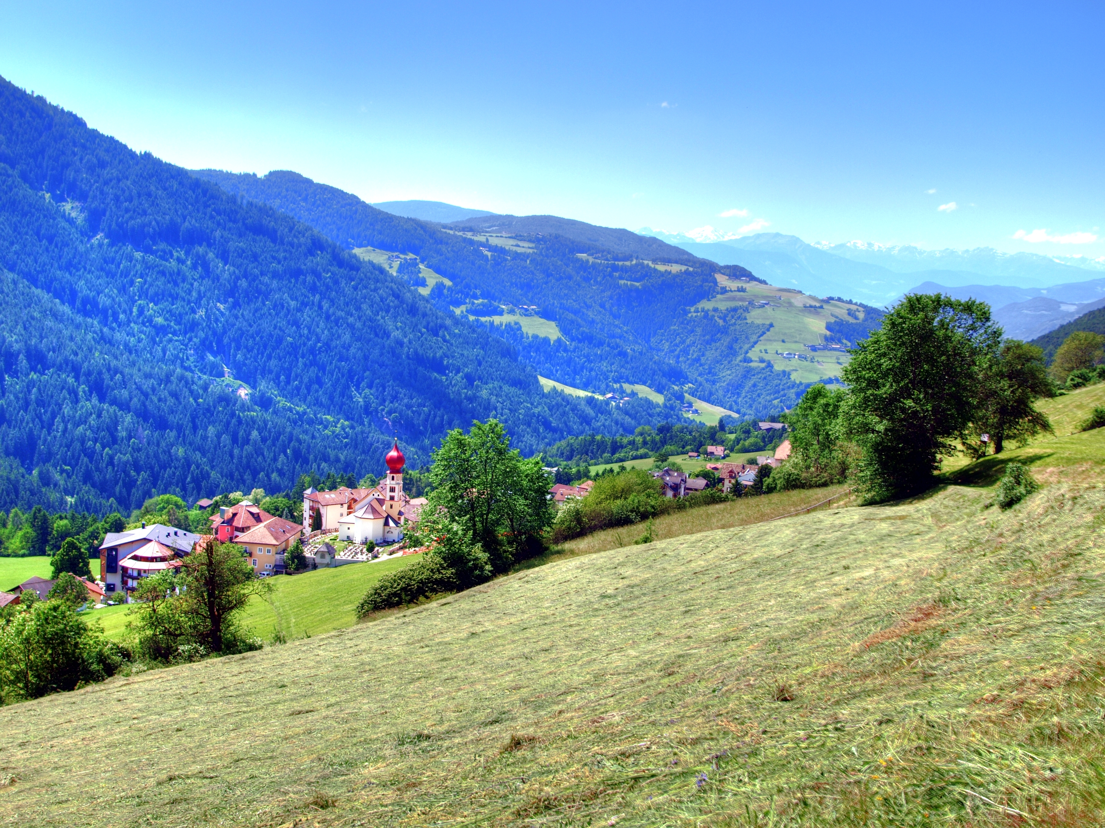 Tiers in Tirol, Blick von Weißlahnbad in Richtung Westen.